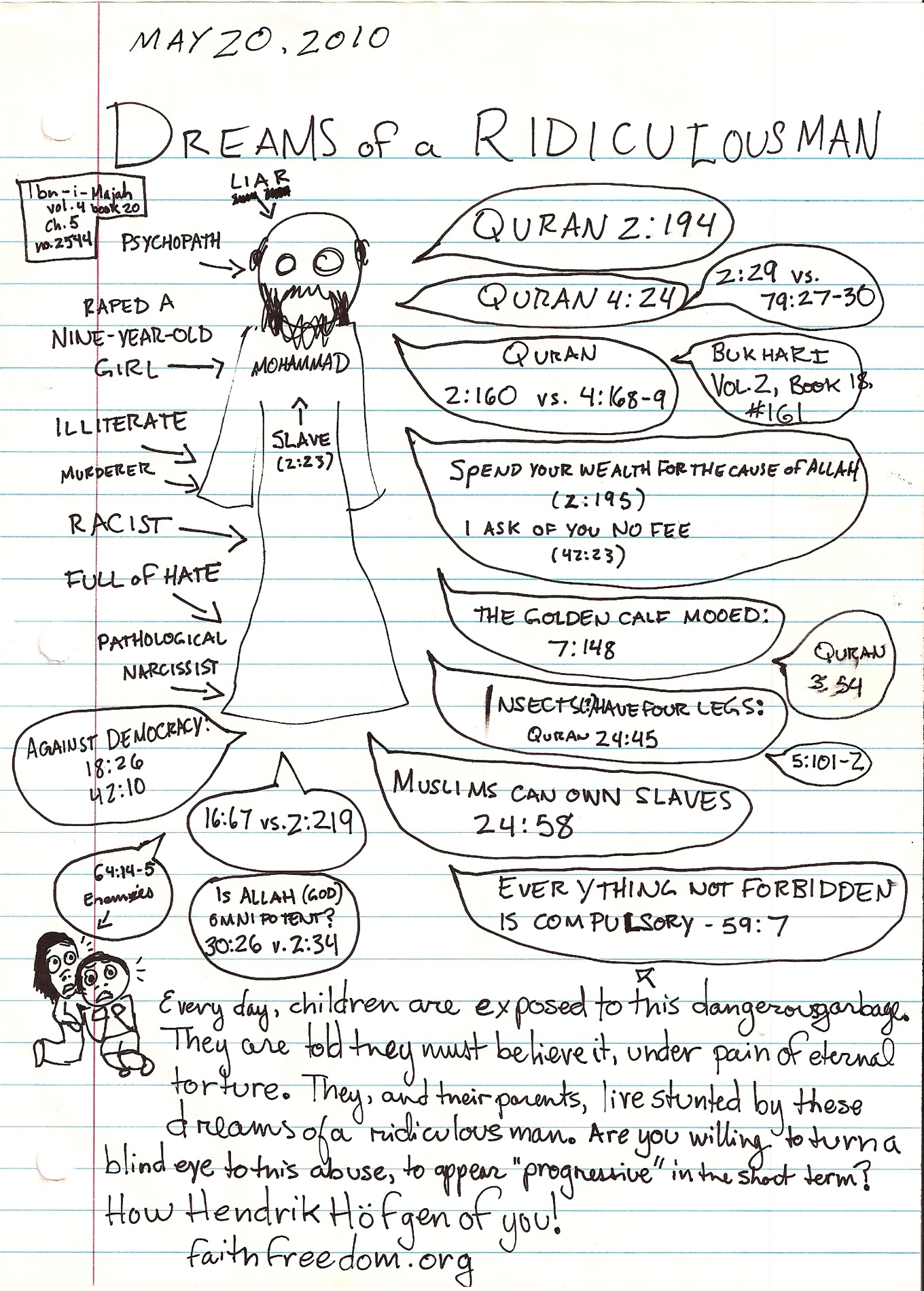 A drawing for "Everybody Draw Muhammad Day," 20 May 2010.